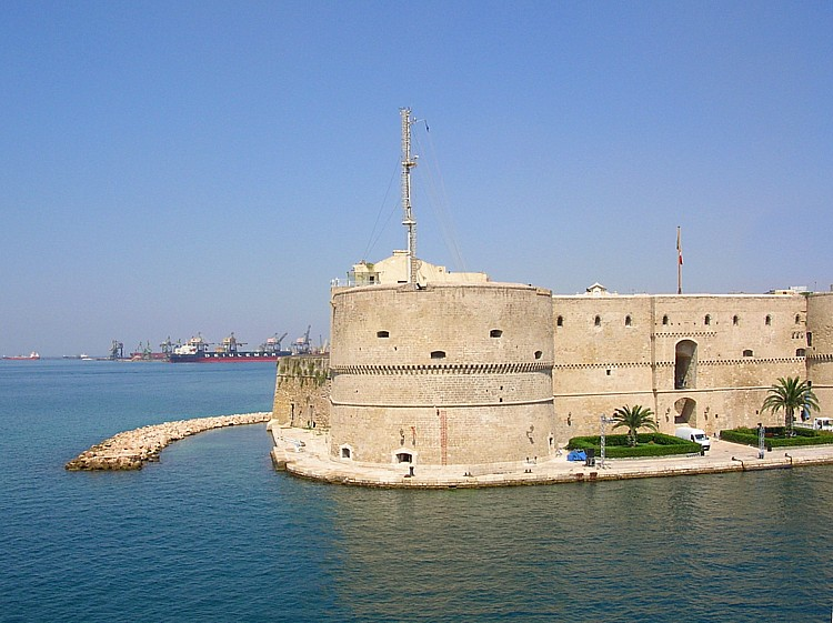 Kasteel van Taranto